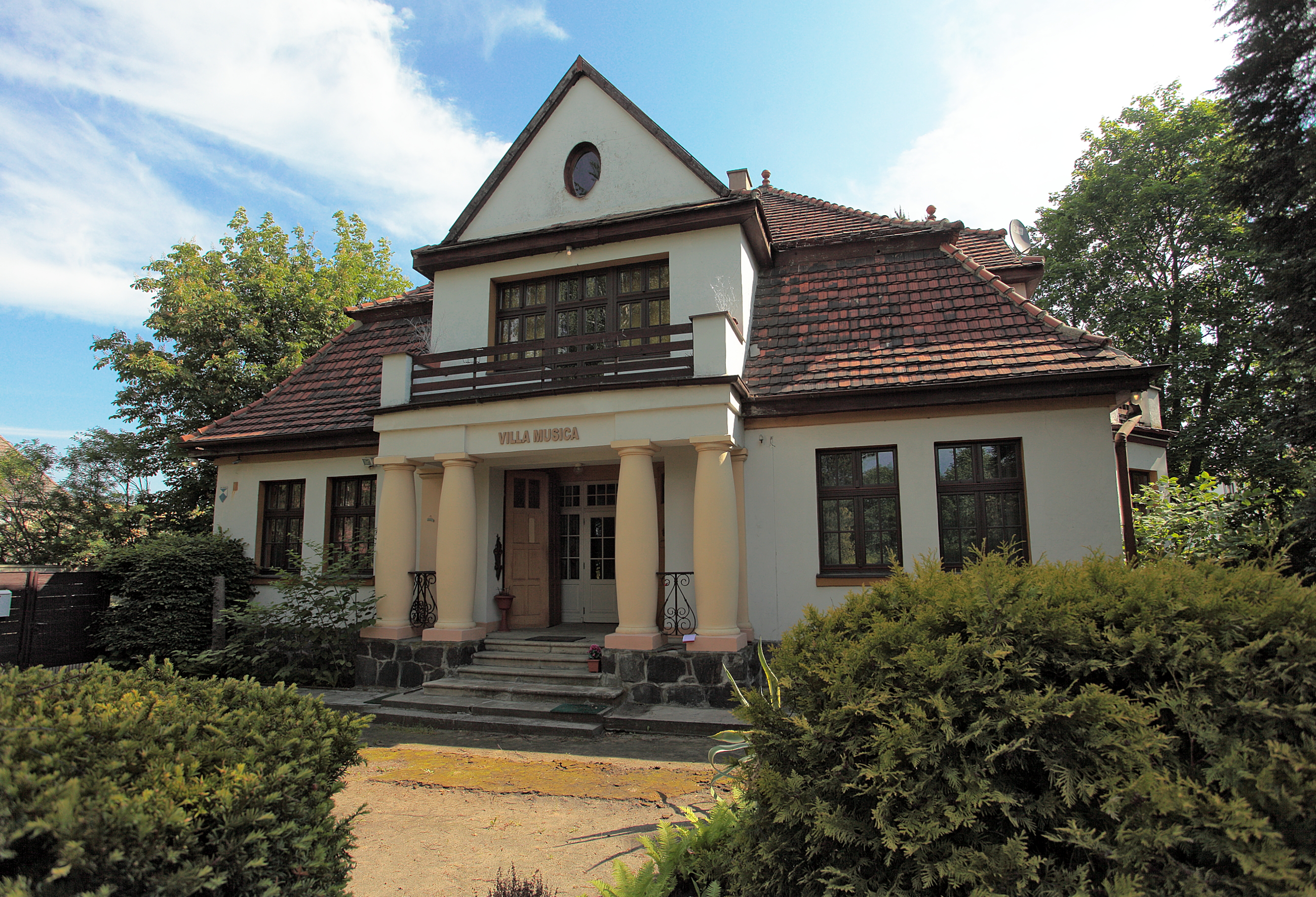 Przyszła siedziba Muzeum Piaśnickiego w Wejherowie.